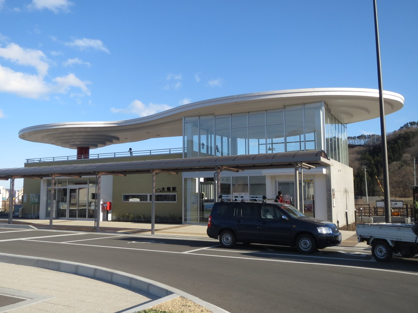 復旧直後の大槌駅 Canon IXY 3